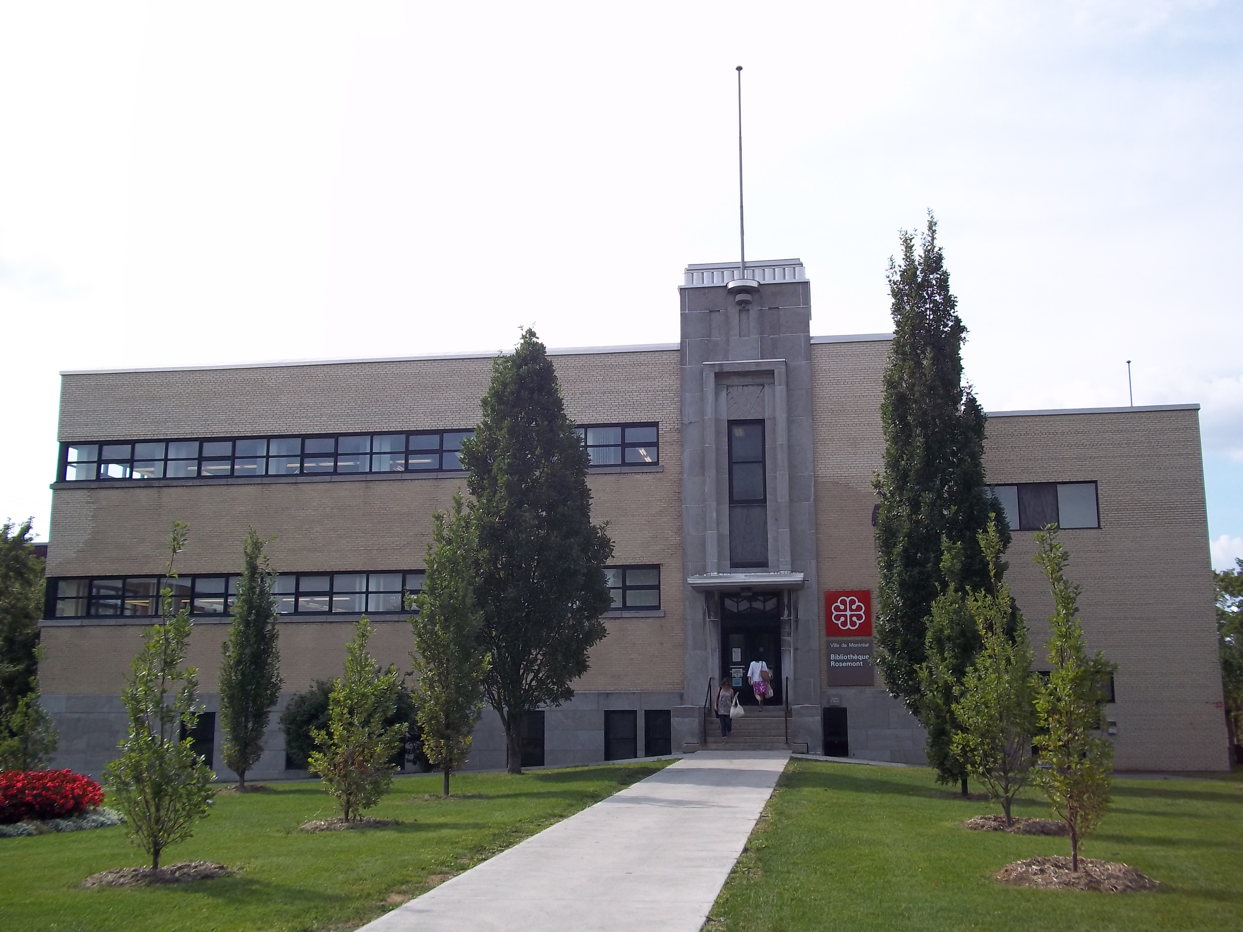 Bibliothèque Rosemont, 3131, boulevard Rosemont, Montréal